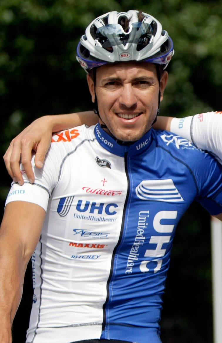 Carlos Alzate con el maillot del unitedhealthcare 2014.